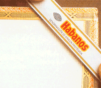 Sigle AOC de Habanos S.A